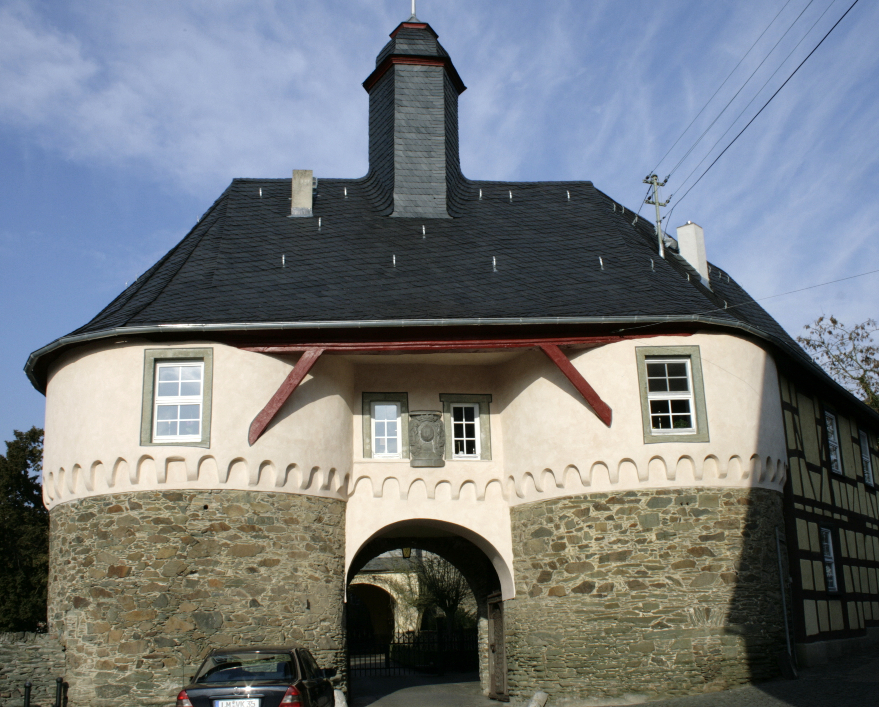 Schlosstor in Runkel, Deutschland